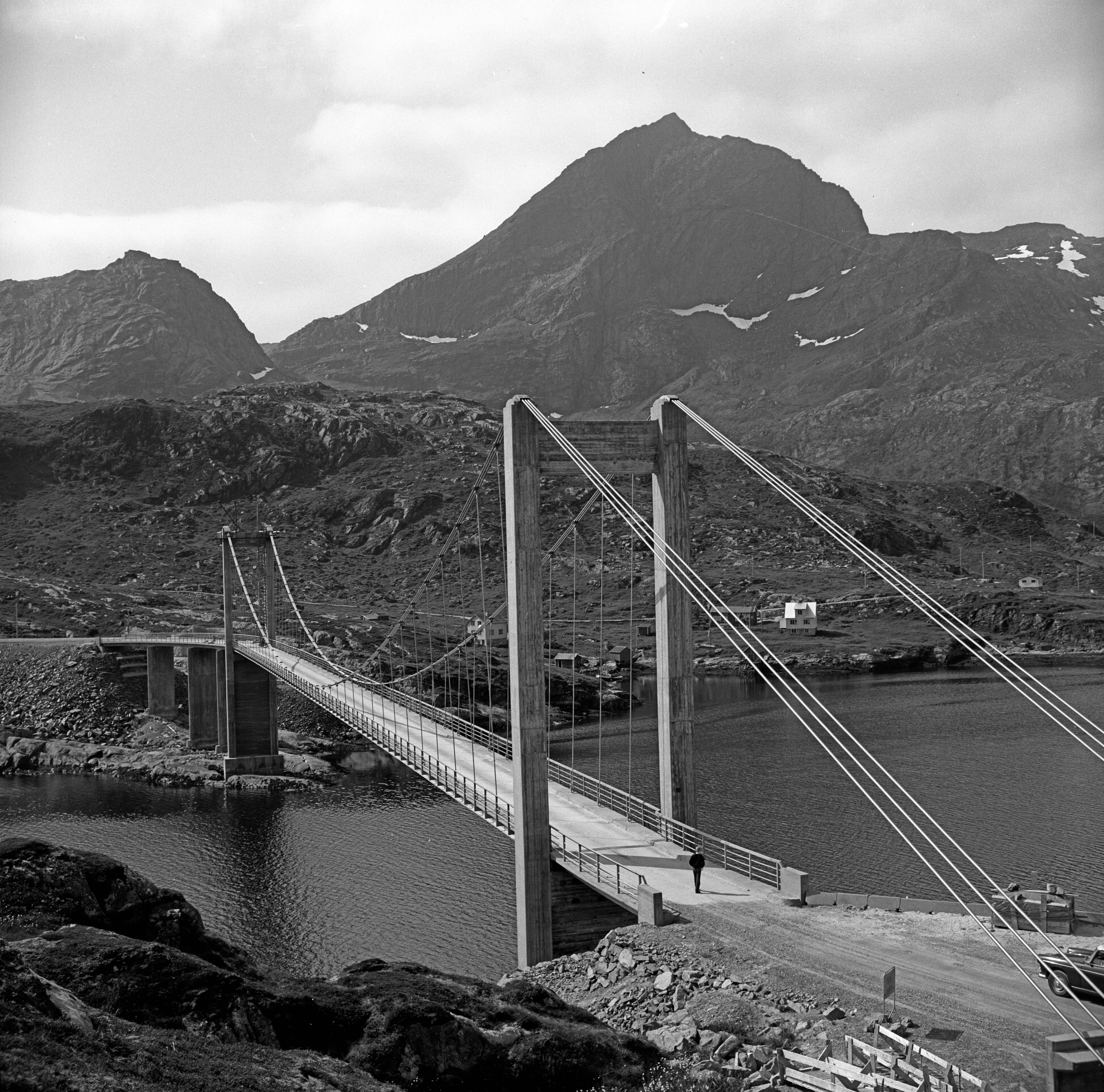 Bildet er hentet fra Nordlandsmuseet bildesamling etter Kanstad. Motivbeskrivelse: Den gamle Kåkern brua Nøkkelord: Topografi og geologi Veier og broer